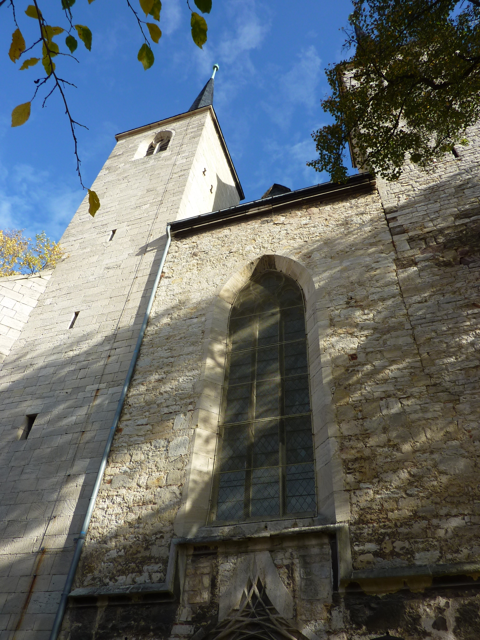 Moritzkirche (Naumburg)